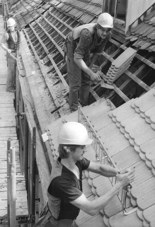 Berlin, VEB Baureparaturen Lichtenberg Jugendbrigade ADN-ZB Settnik 3.8.84 Berlin: Bestleistungen zum Weltfriedenstag-Pieter Markendorf, Uwe Schneider und Uwe Schulz (von vorn) gehören zur Jugendbrigade "Ernst Thälmann" des VEB Baureparaturen Lichtenberg, die sich dem Aufruf der Jugendbrigade Harder angeschlossen hat. Die 15 Maurer, Gerüstbauer, Klempner und Dachdecker wollen eine "Initiativdekade des Kampfes um Bestwerte" durchführen. An ihrem Objekt in der Normannen-Ecke Kubornstraße müssen insgesamt 1 100 Quadratmeter Dachfläche instandgesetzt sowie 30 Schornsteine abgetragen und neu aufgebaut werden.